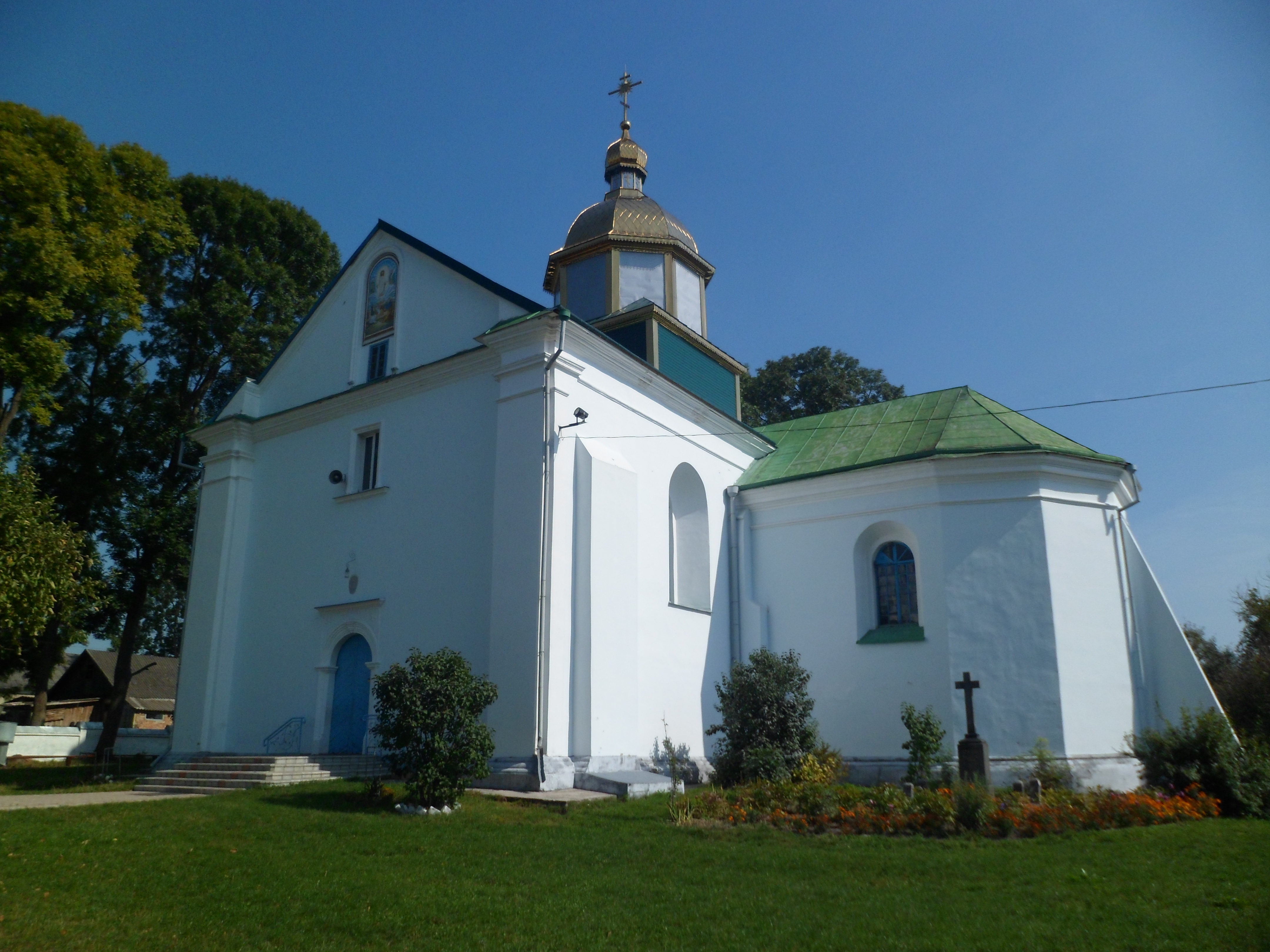 Спасо-Преображенська церква, Шумськ, вул. Українська, 13